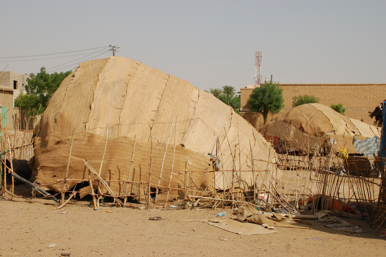 Traditional tent of Beja, Sudan, Atbara